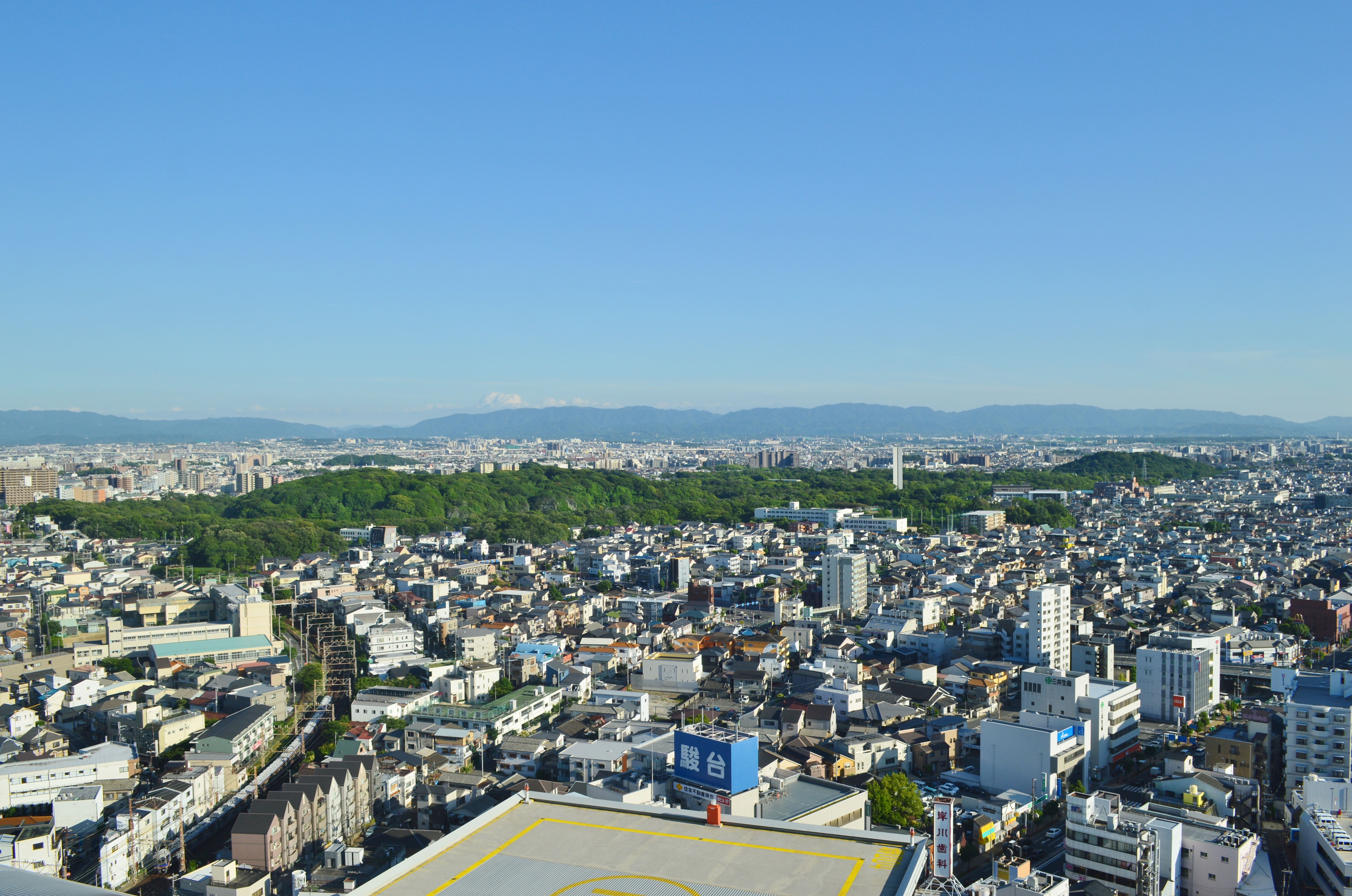 百舌鳥古墳群 全景（田出井山古墳除く）